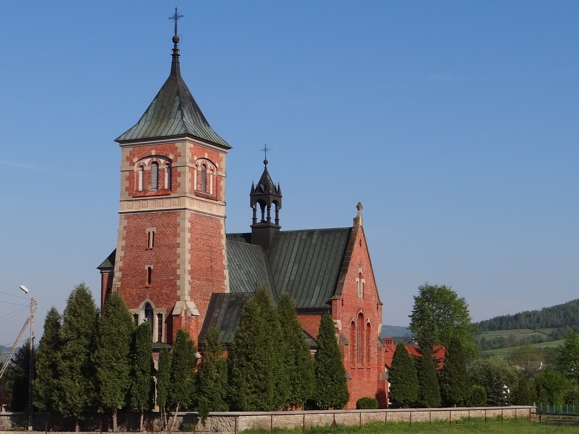 Kościół w Kasince Małej